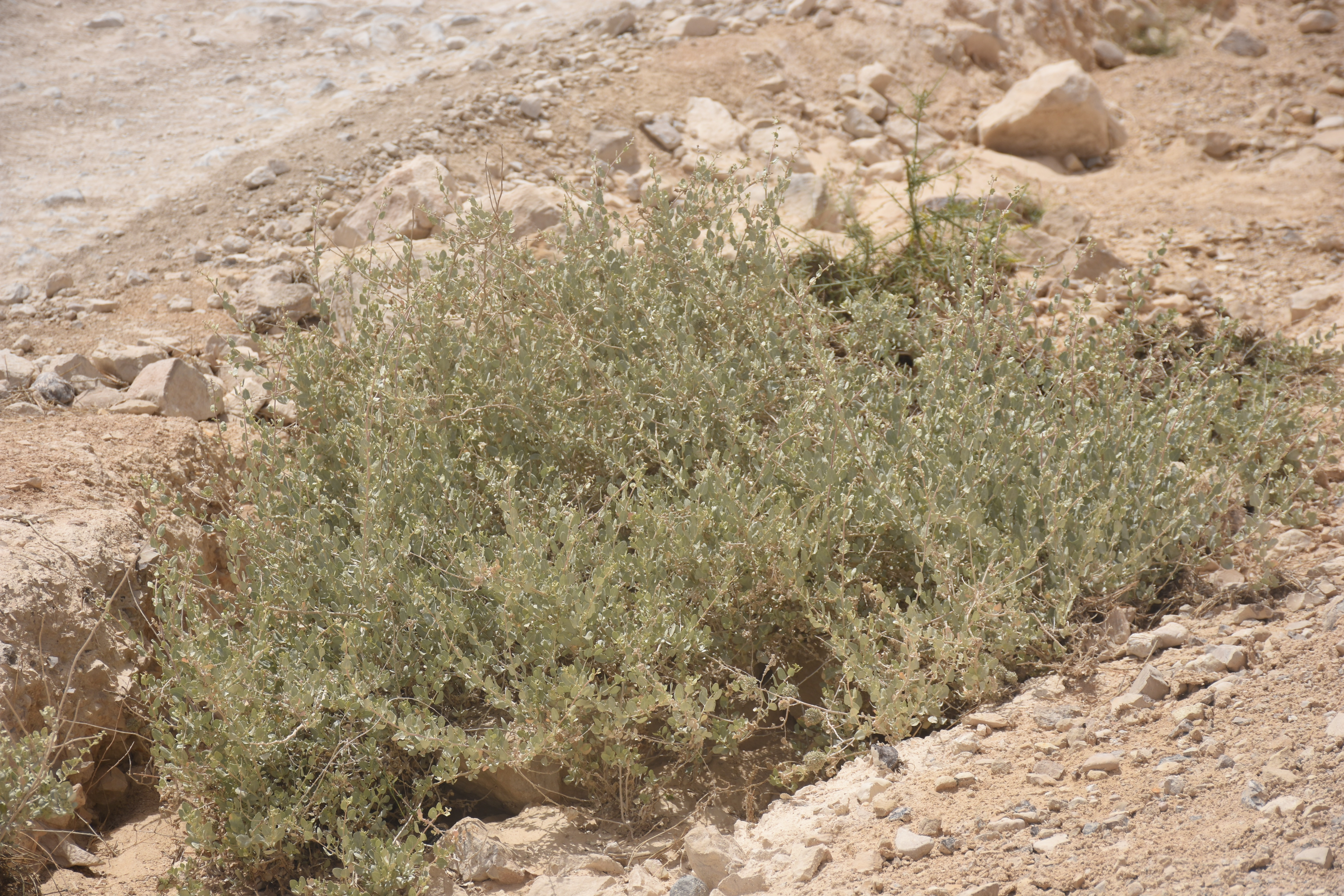 שיח מלוח קיפח במדבר יהודה